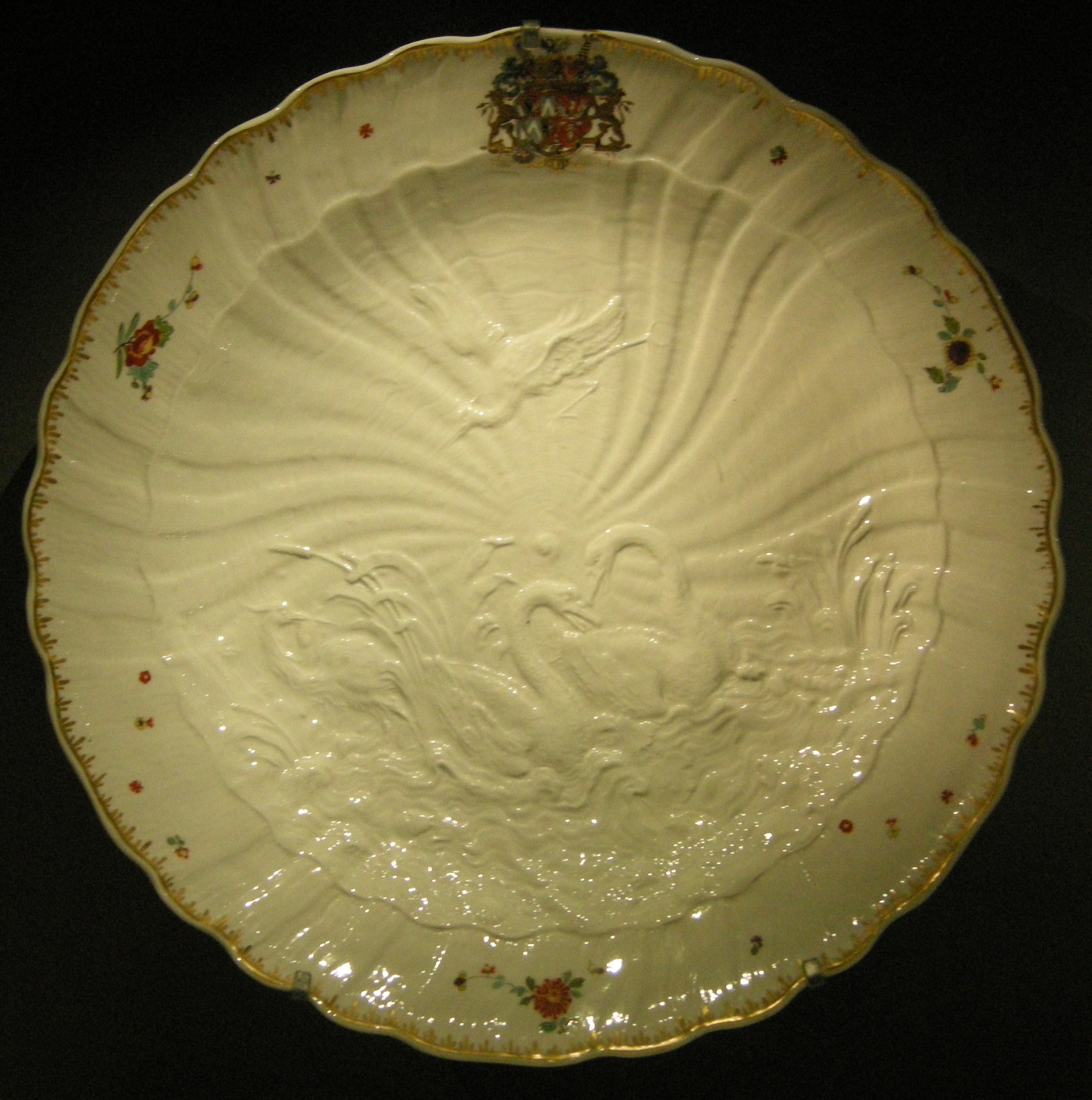 Ngv, manifattura di meissen, piatto, 1736 circa